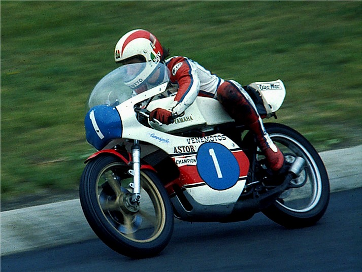 Bildbeschreibung: Johnny Cecotto auf Yamaha TZ C, 350 cm³ Fotograf: Lothar Spurzem Datum: 28.08.1976 beim Training zum Großen Preis von Deutschland auf dem Nürburgring